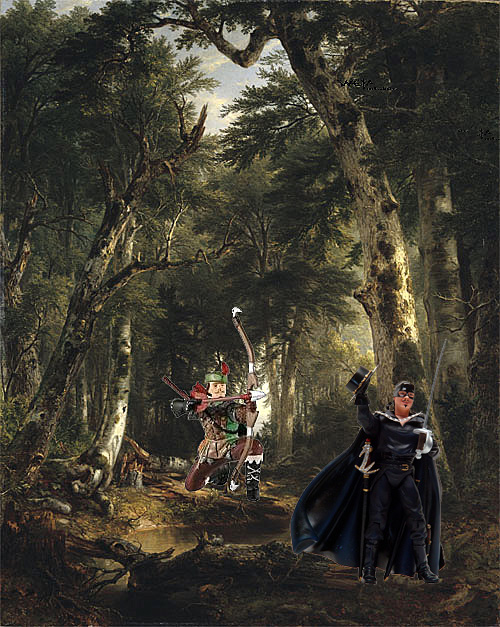 Robin Hood & Zorro